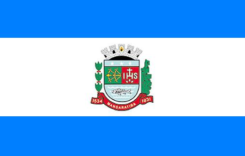 Bandeira do município de Mangaratiba.